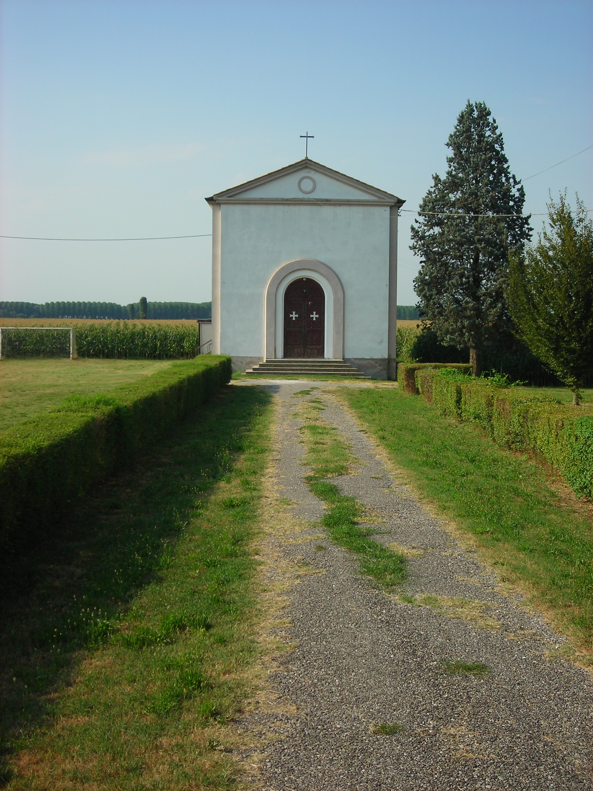 Chiesa di San Zeno a San Zeno in Valle (com. di Villa Bartolomea -VR-)